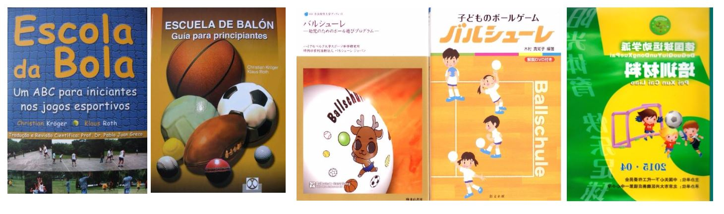 Lehrpläne der Ballschule Heidelberg in unterschiedlichen Sprachen.